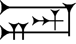 Cuneiform sign